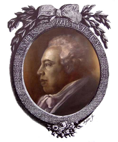 Antonín Vranický, deutsch Anton Wranitzky